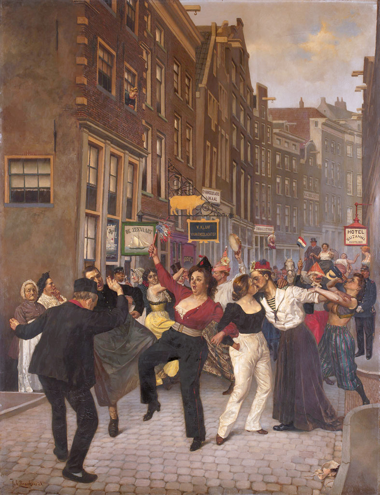 Hartjesdag omstreeks 1900 olieverf op doek 150 x 117 cm signatuur l.o: Joh. Braakensiek 1926